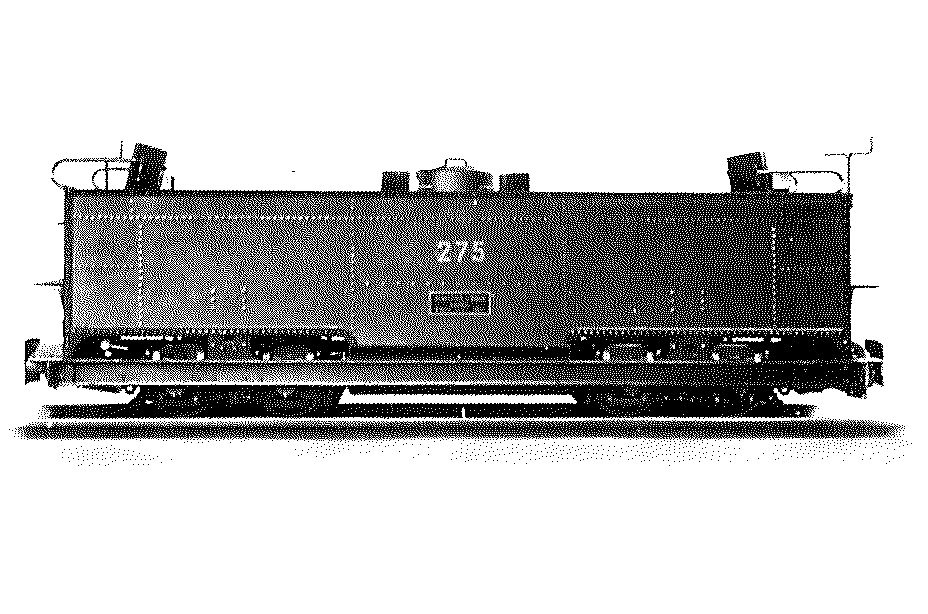 Brigadetender Spurweite 600mm für 5000 l Wasser